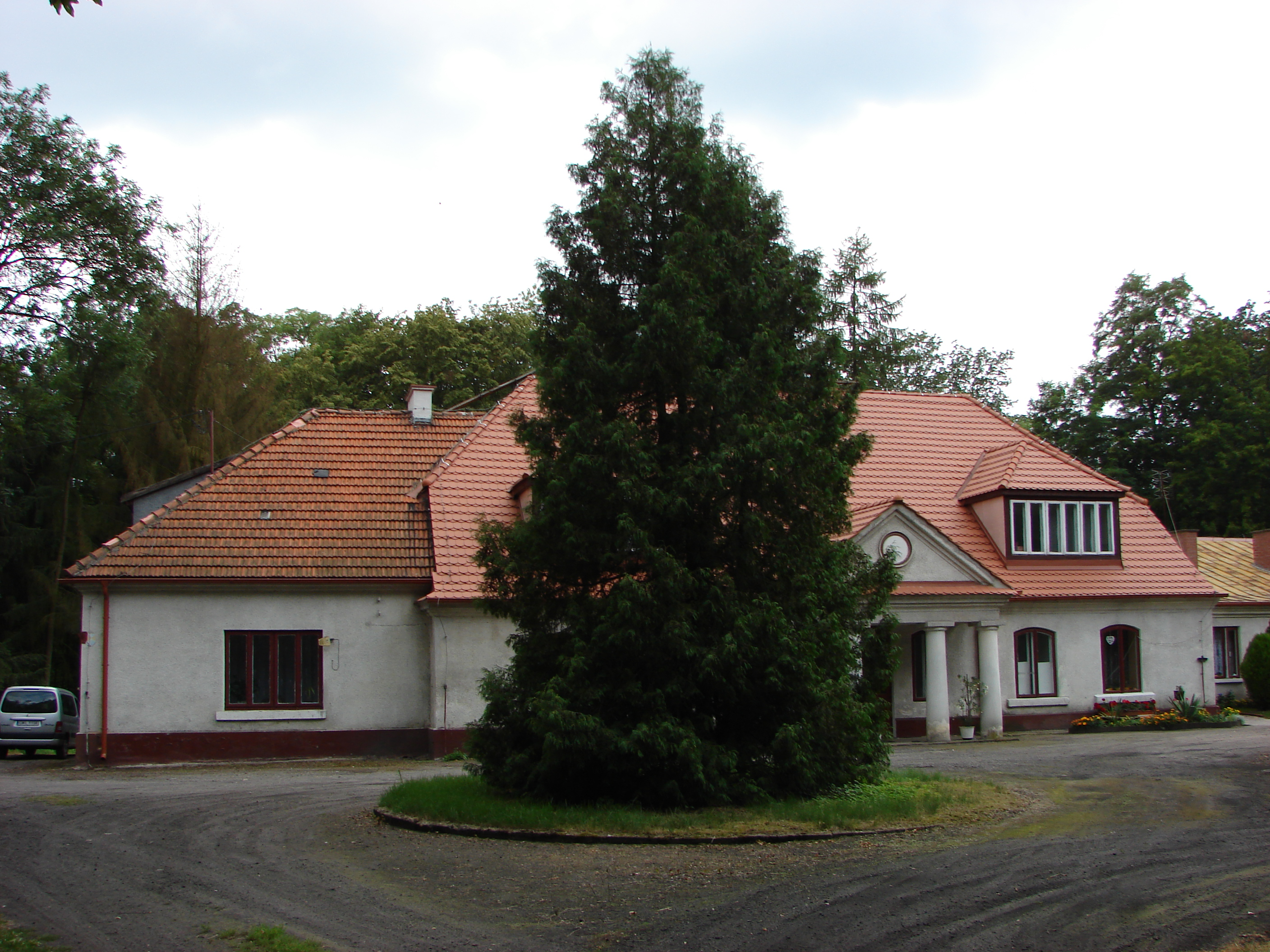 Kamienna - dwór, po 1810, 1851